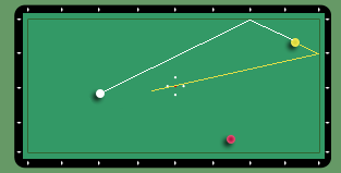 tiro biliardo spondabilia